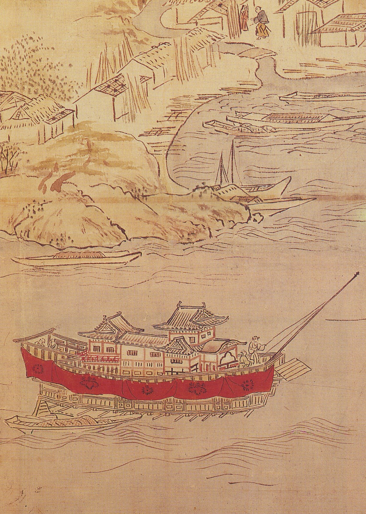 『肥前名護屋城図屏風』に描かれている安宅船の内、一隻を引用